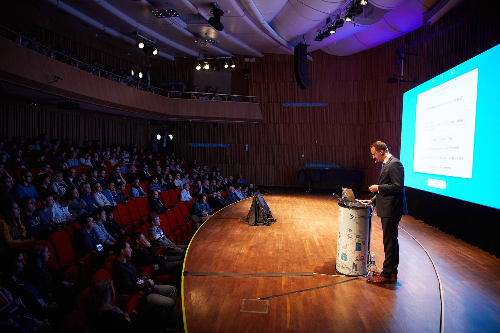 Unicorn College open